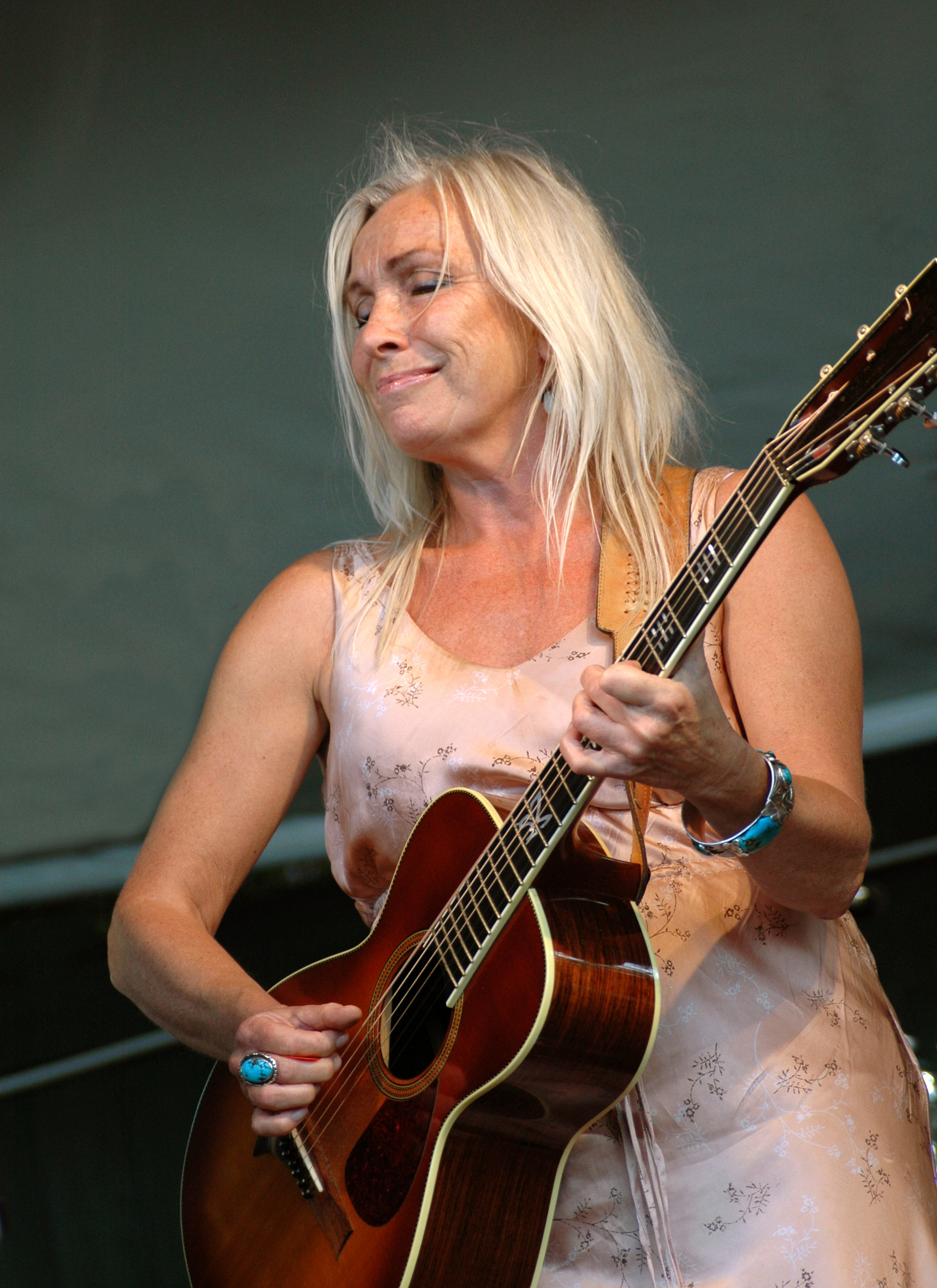 Marie Bergman på Cornelisdagen i Stockholm, 2 augusti 2009